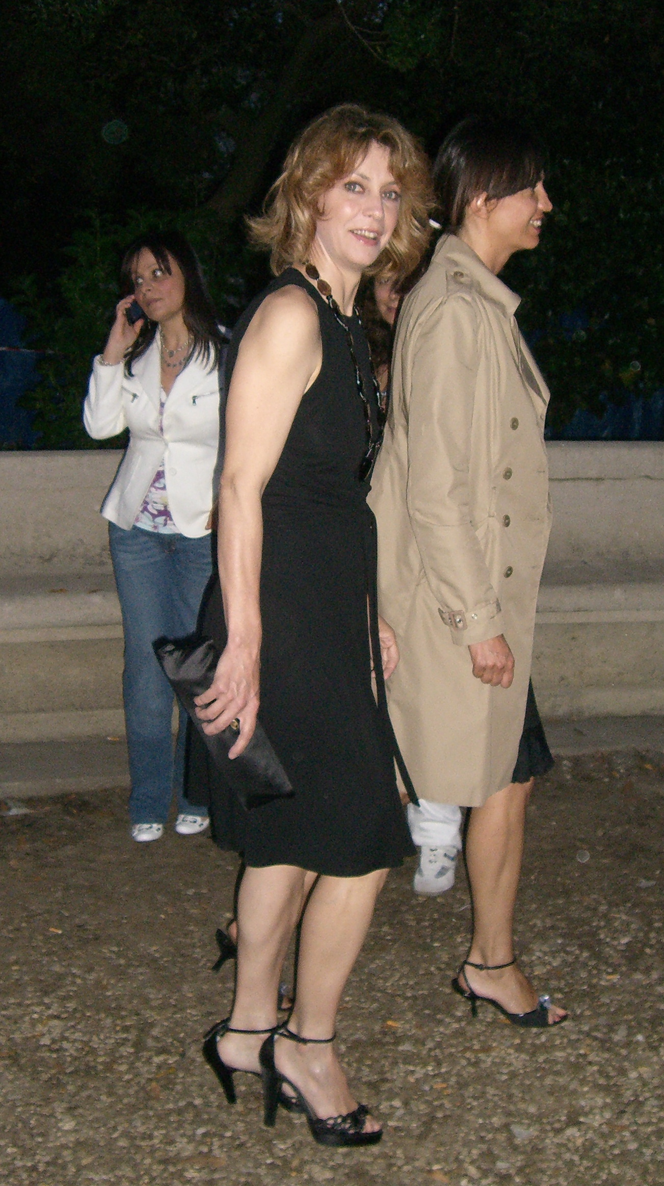 L'attrice Margherita Buy